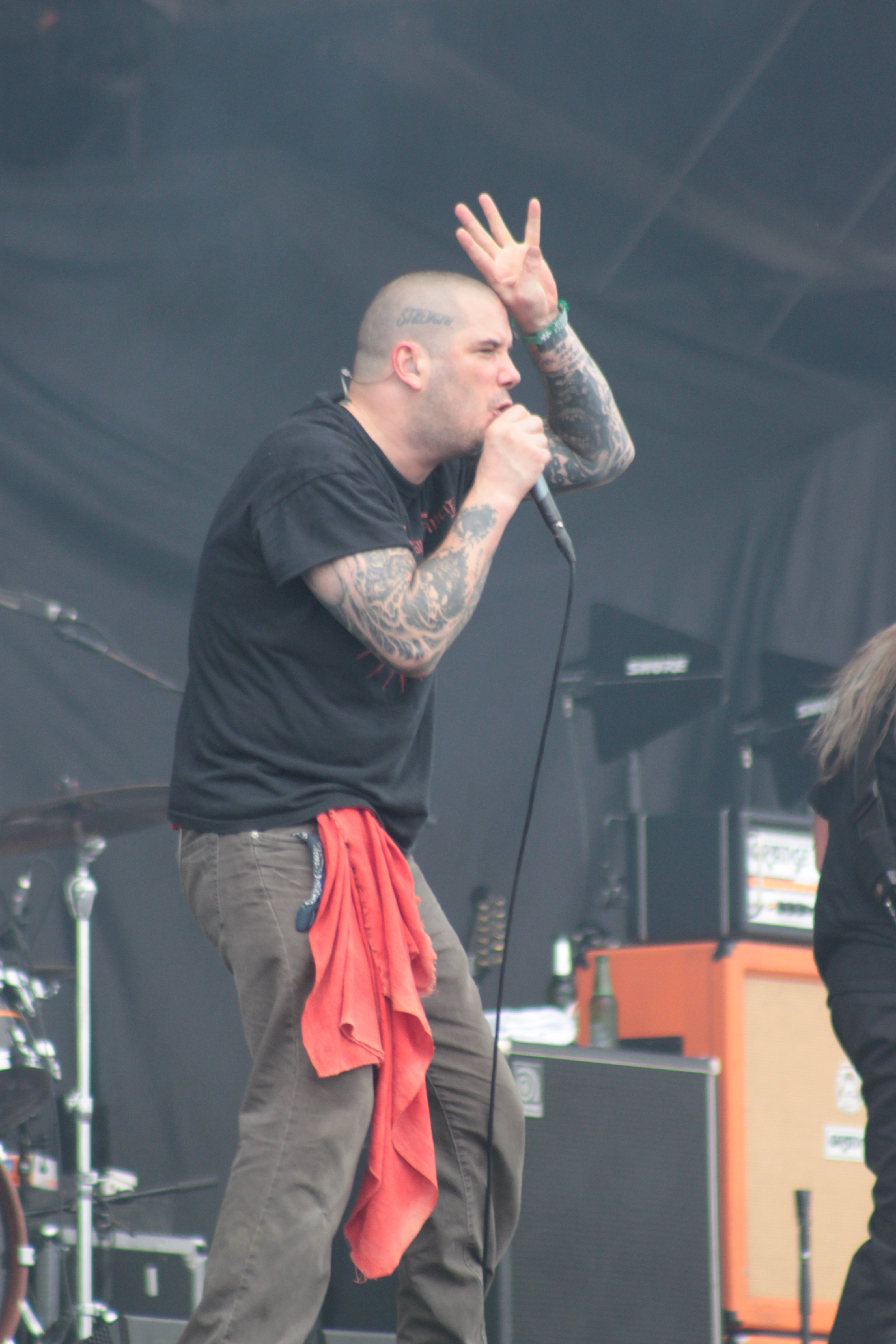 Phil Anselmo, Down, Hellfest 2013, Fr-44-Clisson.